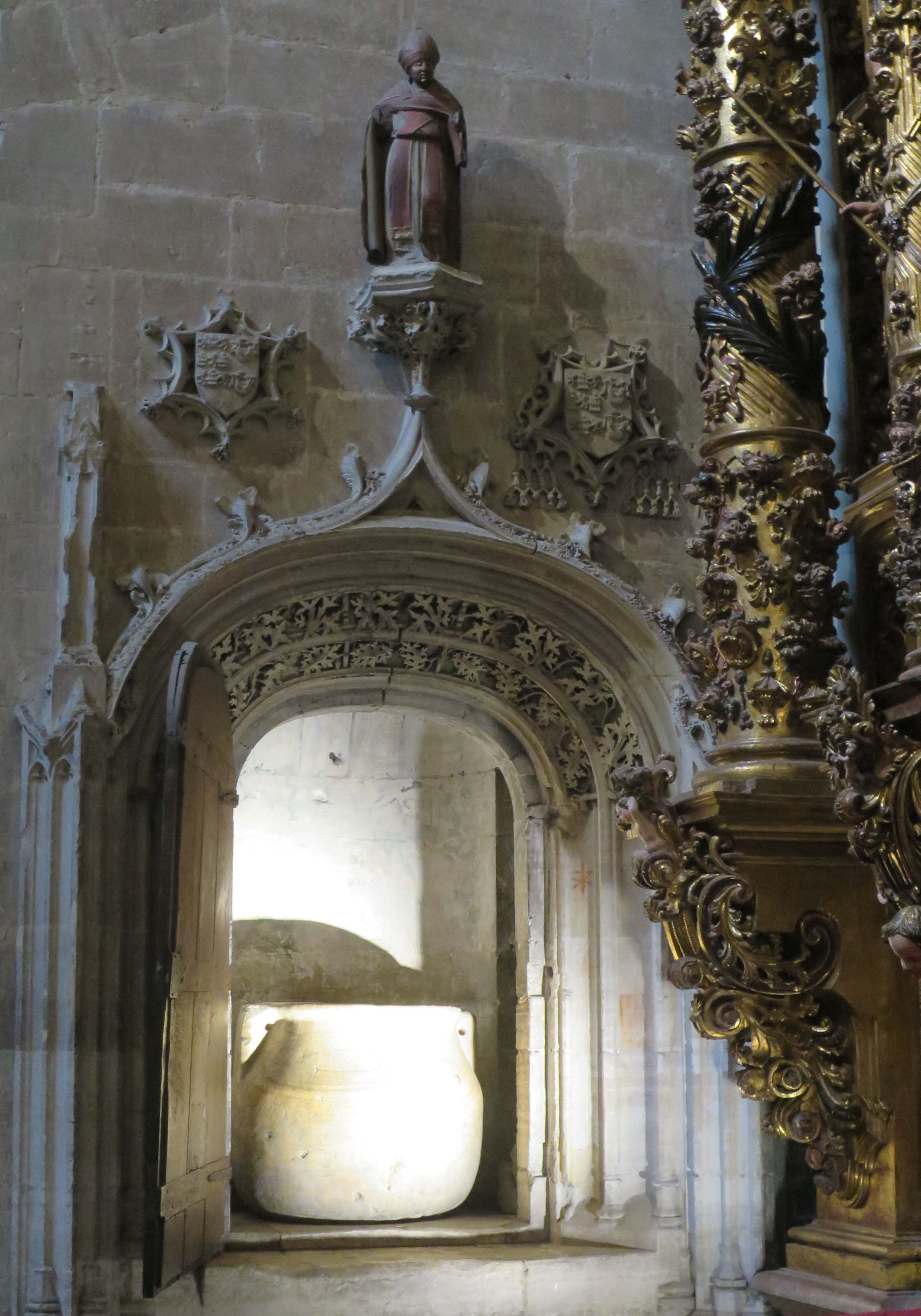 Steingefäß in der Kathedrale von Oviedo, das nach örtlicher Tradition als einer der sechs Steinkrüge gilt, in dem Jesus bei der Hochzeit zu Kana Wasser in Wein verwandelte.